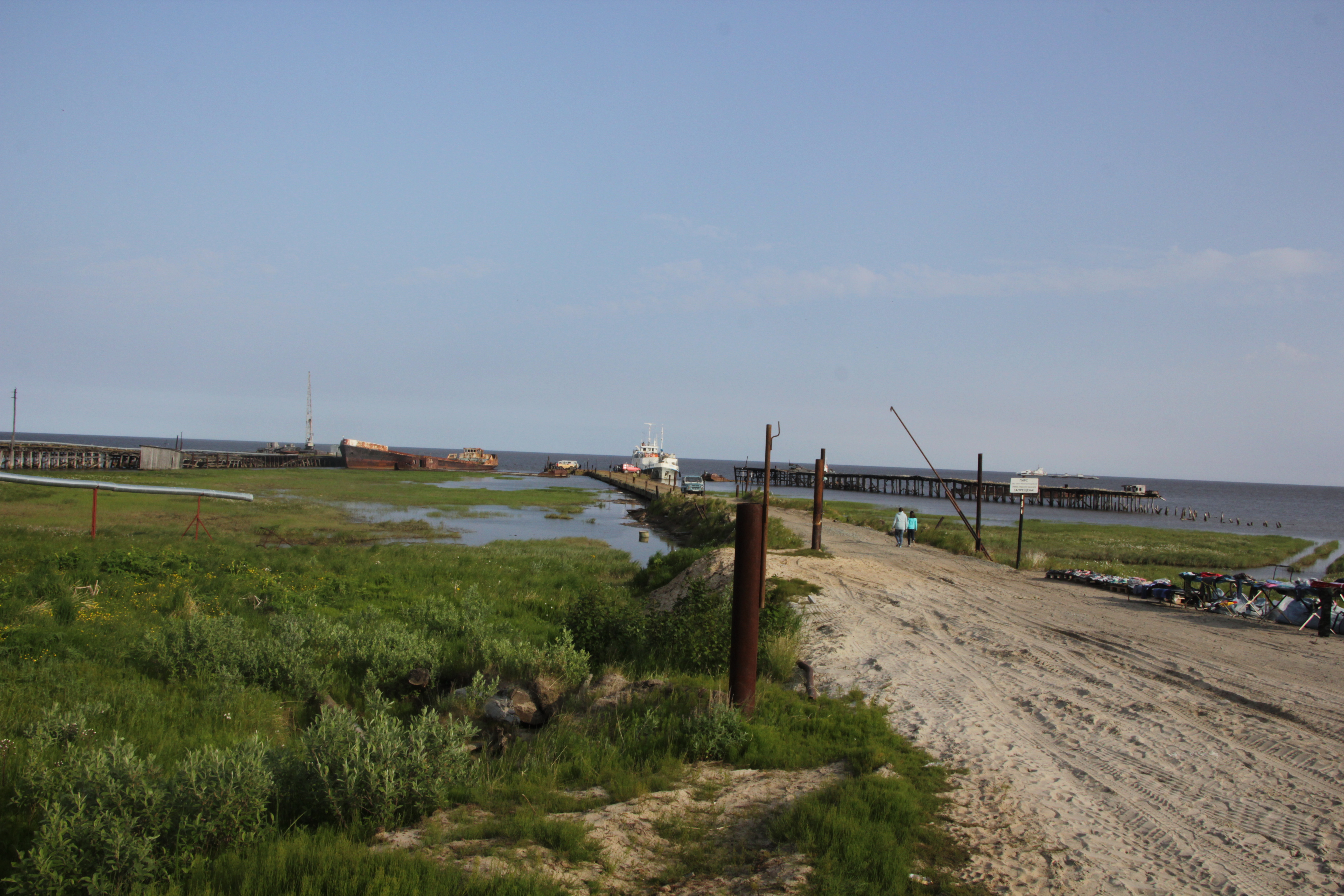 Hafen von Nowy Port, Nordsibirien. In der Mitte der aktuell verwendbare Anleger aus Pontonteilen, rechts und links aufgegebene Bauwerke aus Holz.